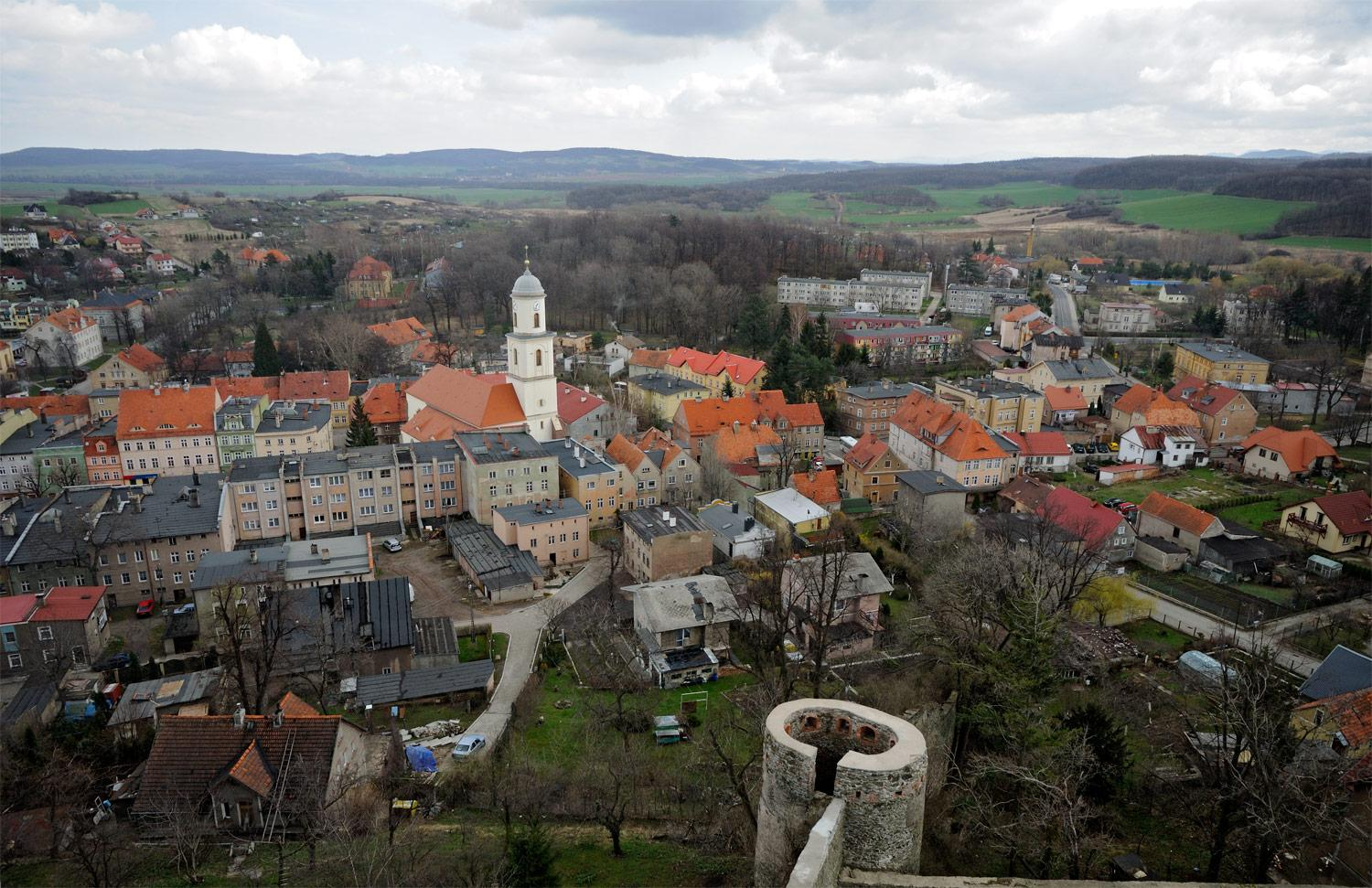 Bolków widziany z zamkowej wieży. Miasto jest malutkie - liczy niespełna 5,5 tys. mieszkańców.